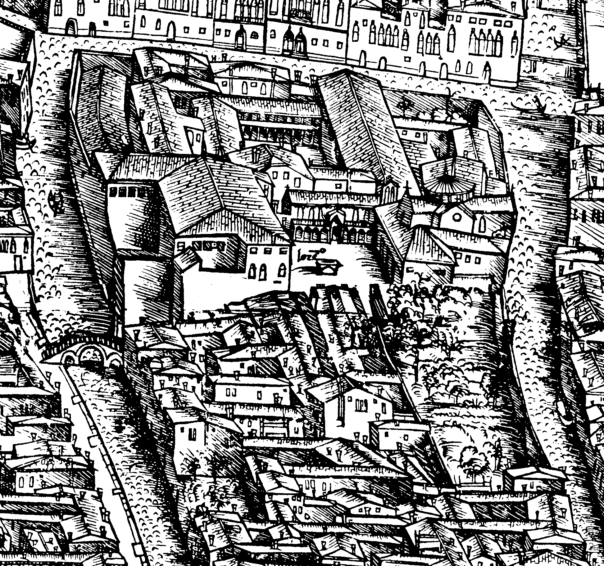 Il convento di San Lorenzo dalla Pianta di Venezia di Jacopo de' Barbari, 1500